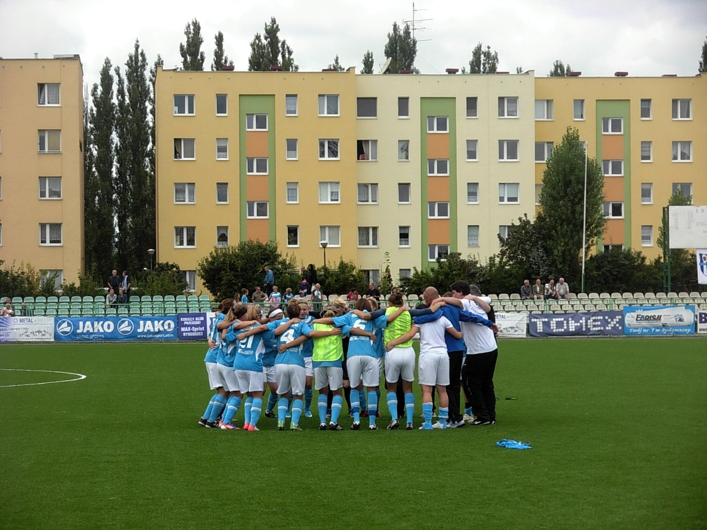 Mecz ekstraklasy piłki nożnej kobiet KKP Bydgoszcz - UJ Kraków